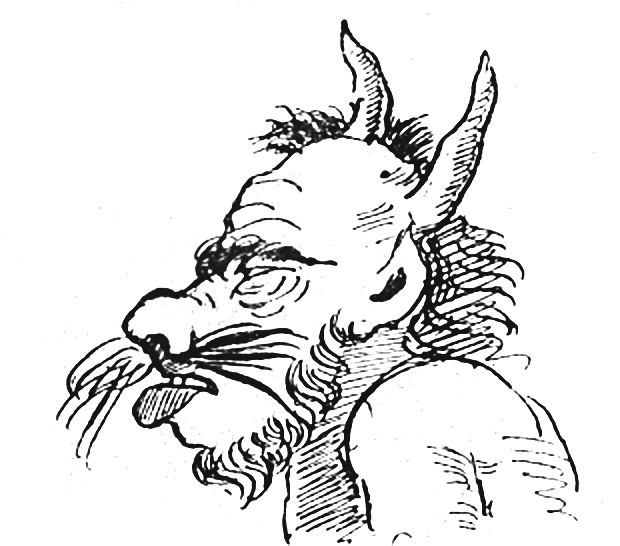 Рисунок Пушкина к рукописи "Сказки о попе и работнике его Балде". Подпись: Старый бѣсъ.